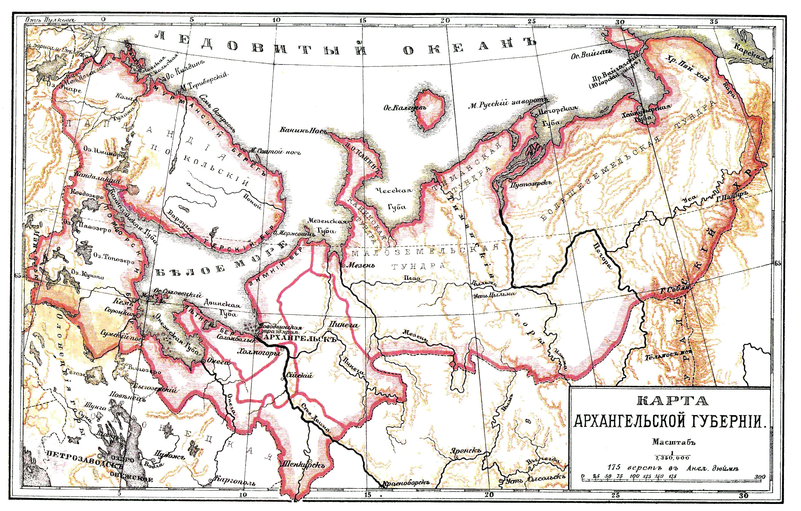 Карта Архангельской губернии, начало 20 века